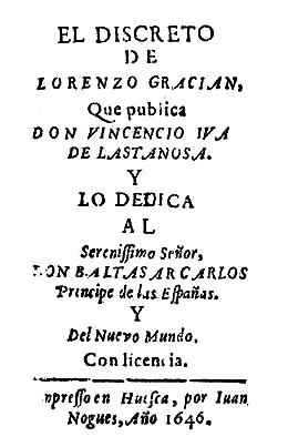 Portada de la edición príncipe del El discreto (1646), de Baltasar Gracián